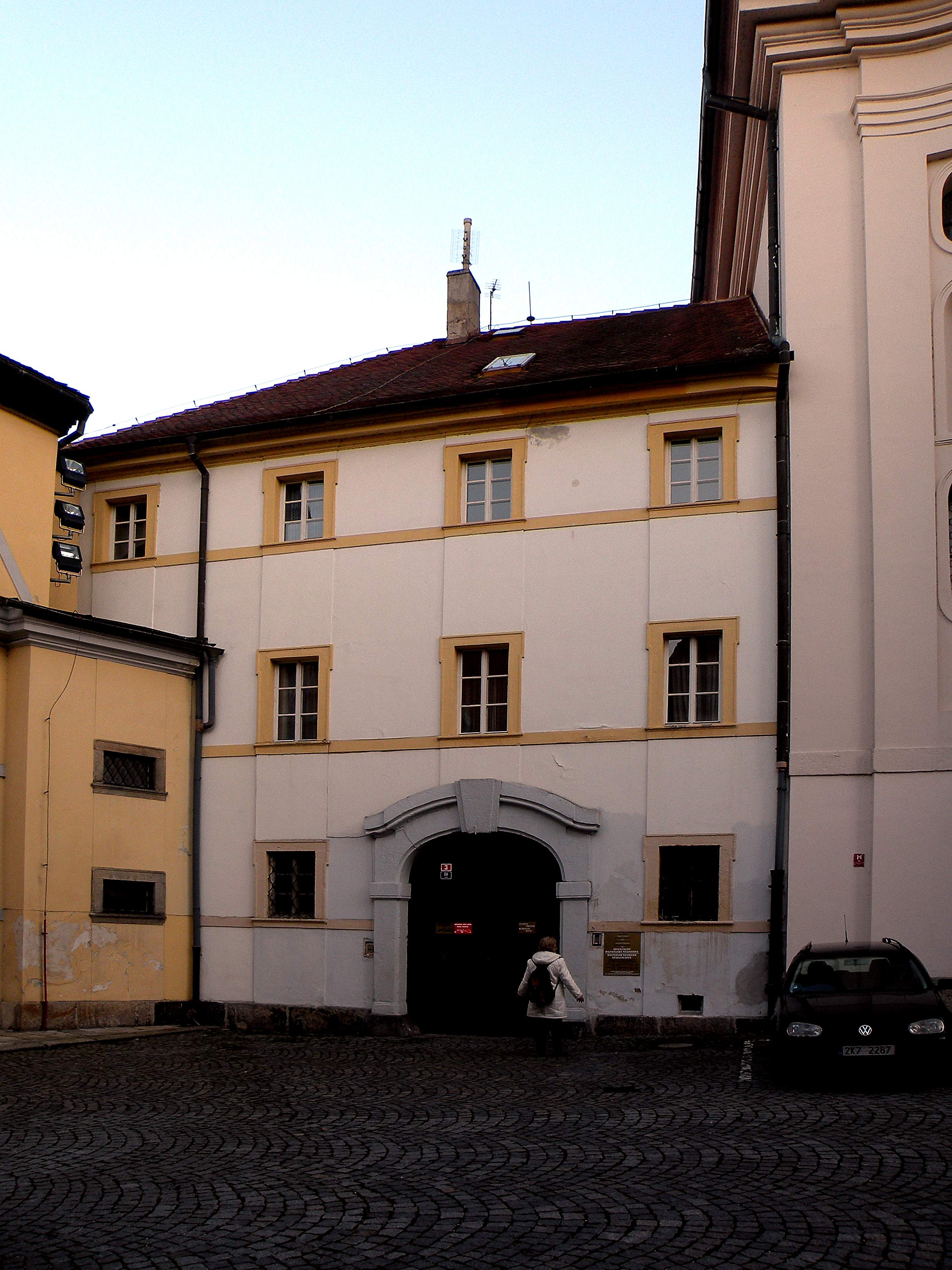 Хеб (Эгер).Здесь родился Б.Нойман.